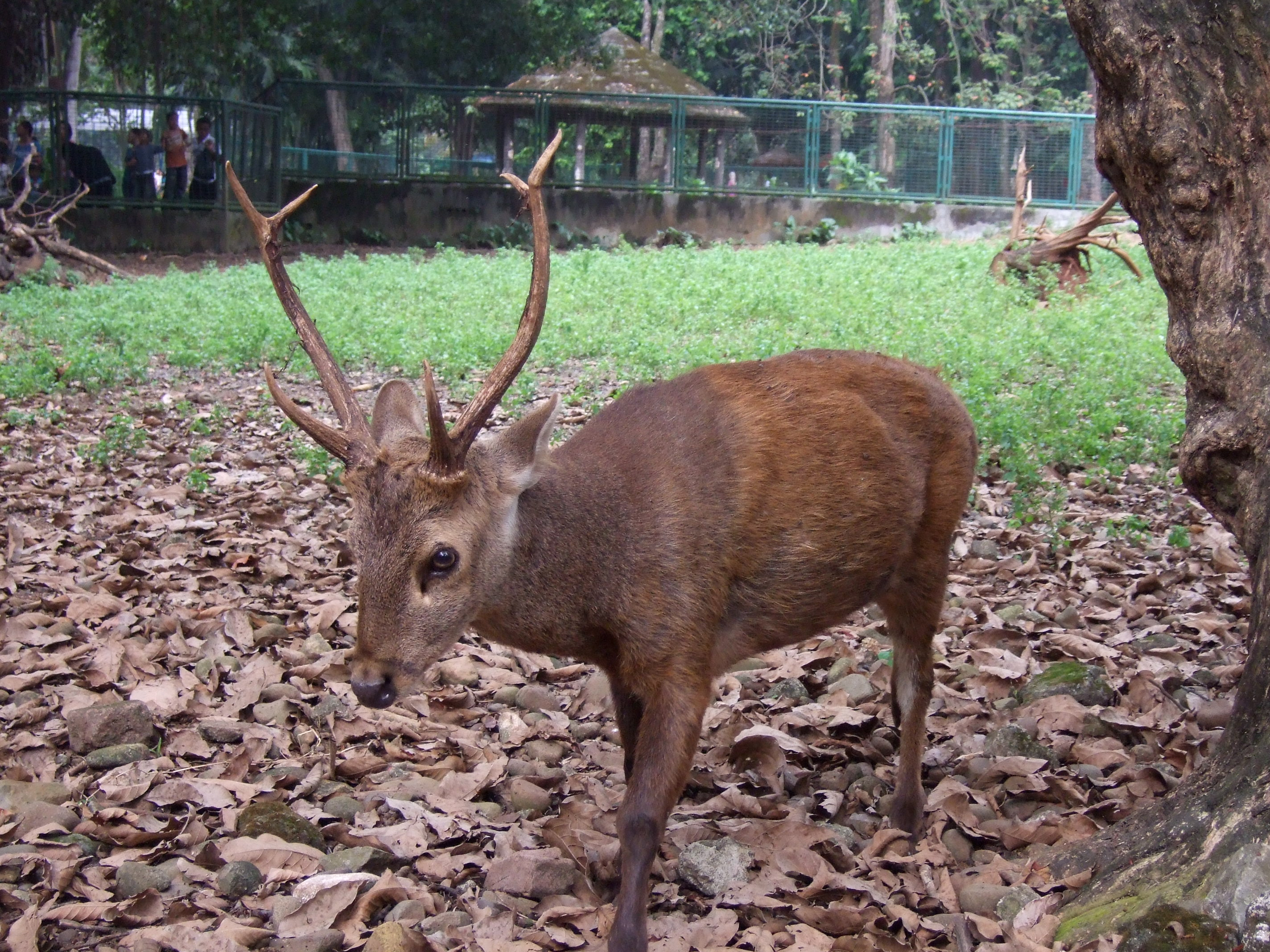 Adult male Bawean deer (Axis kuhlii), picture taken at Ragunan Zoo, Jakarta, Indonesia